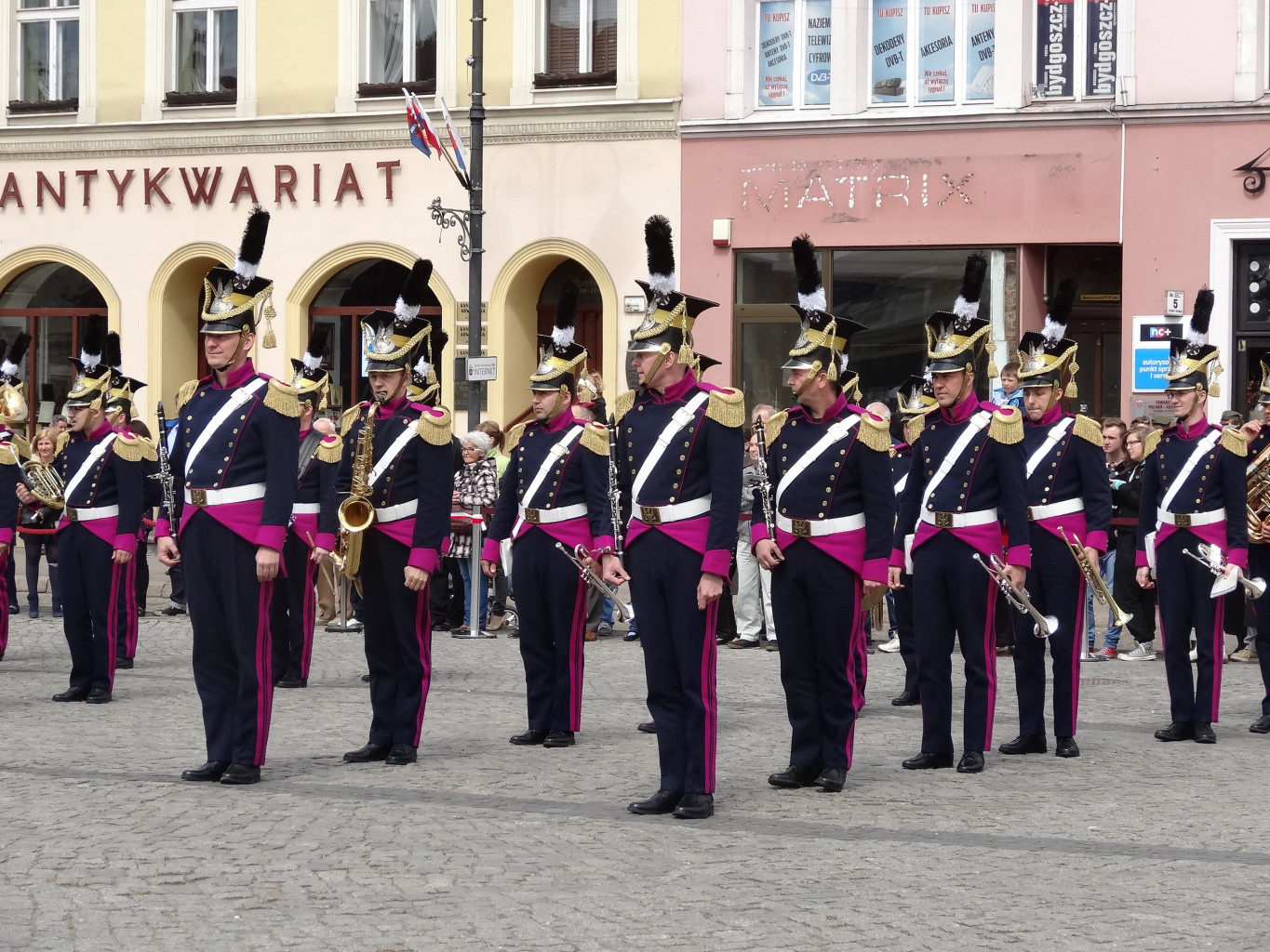 Święto Konstytucji 3 Maja 2014 roku na Starym Rynku w Bydgoszczy z udziałem orkiestry wojskowej garnizonu bydgoskiego oraz Zespołu Pieśni i Tańca Ziemia Bydgoska